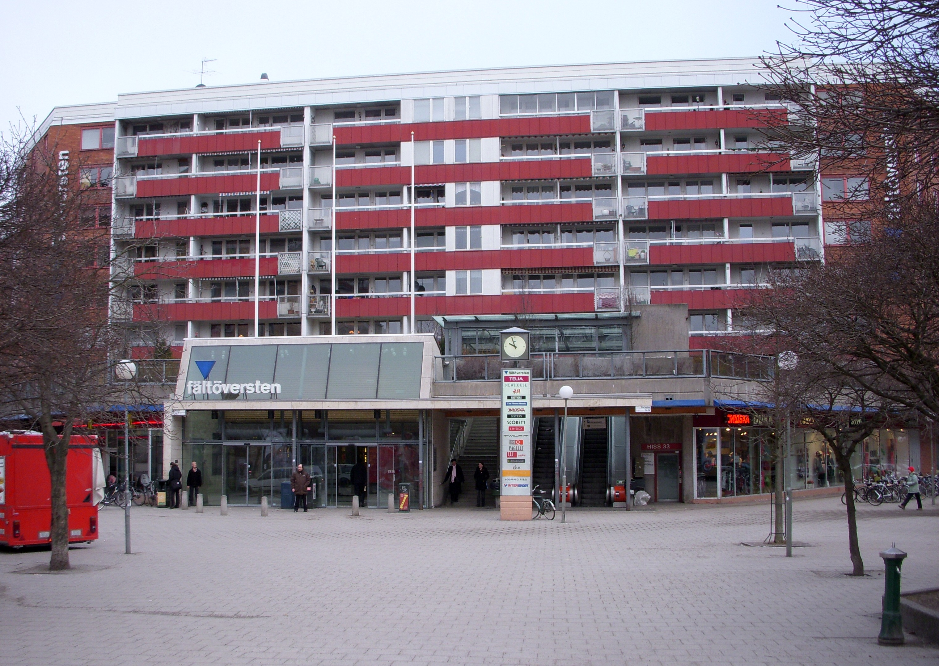 Kvarteret "Fältöversten" på Östermalm i Stockholm